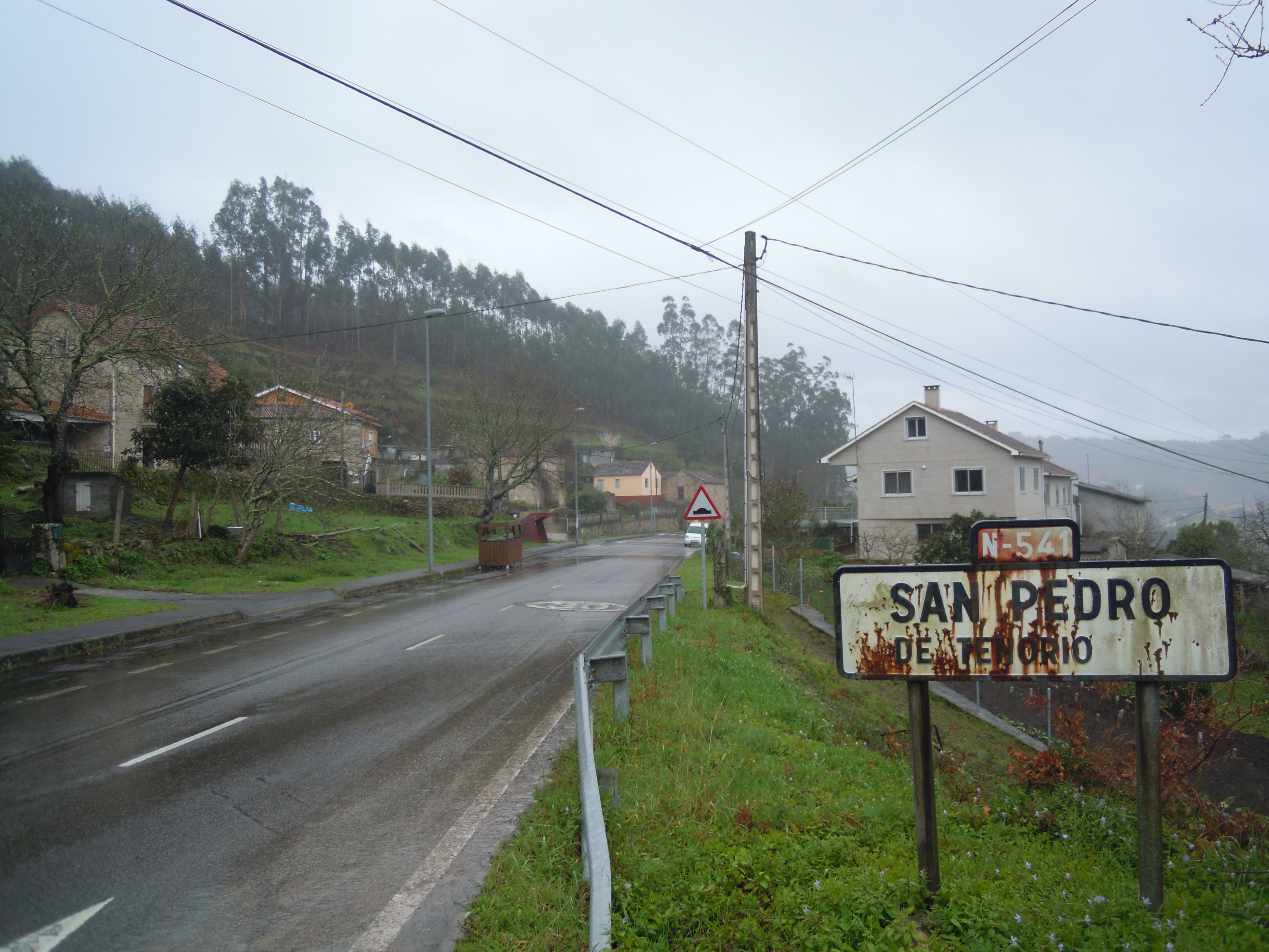 Tramo vello da estrada N-541 entrando na aldea de Cachadiñas (Tenorio, Cerdedo-Cotobade)